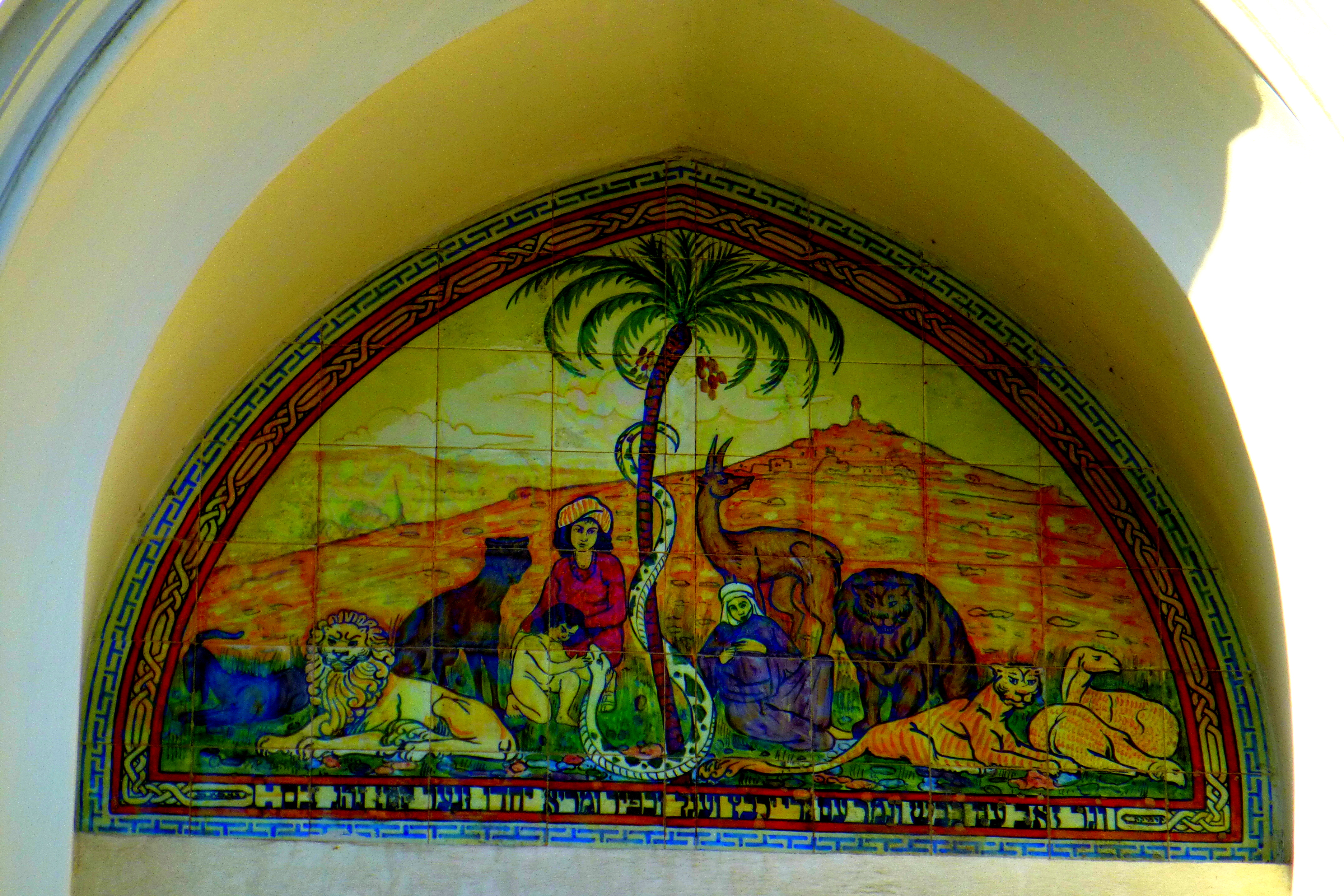 "בית הספר אחד העם" הוא מבנה בית ספר השוכן ברחוב אחד העם בתל אביב. בית הספר נבנה בשנת 1924 בתכנונו של האדריכל ד. הרשקוביץ כ"בית הספר העירוני", אולם לאחר שהוענק לאחד העם תואר אזרח כבוד של העיר, בשנת 1924, הוסב שמו של המבנה ל"בית הספר אחד העם".